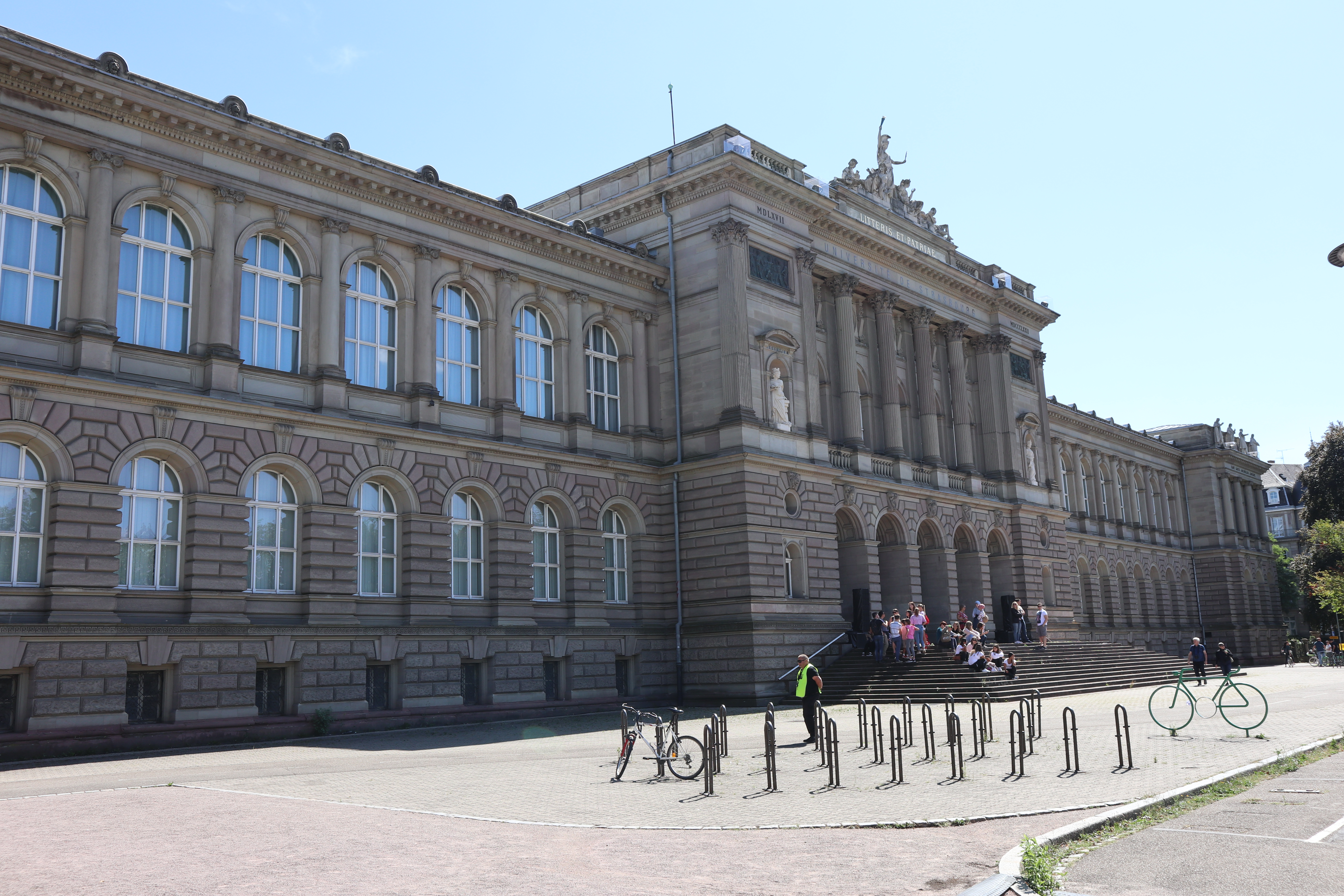 palais universitaire